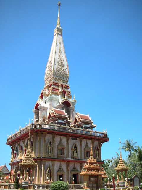 วัดไชยธาราราม ภูเก็ต